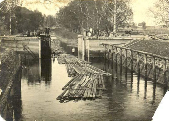 Беларуская (тарашкевіца): Лепель (Lepiel). Шлюз Бярэзінскай воднай сыстэмы (Biarezinskaja) каля вёскі Валовай Гары.